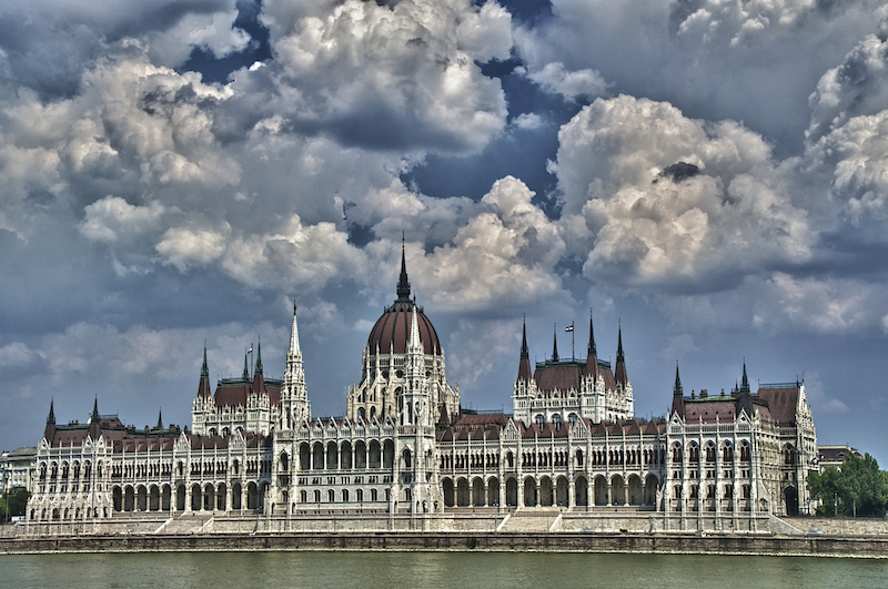 A Parlament látképe a budai oldalról.